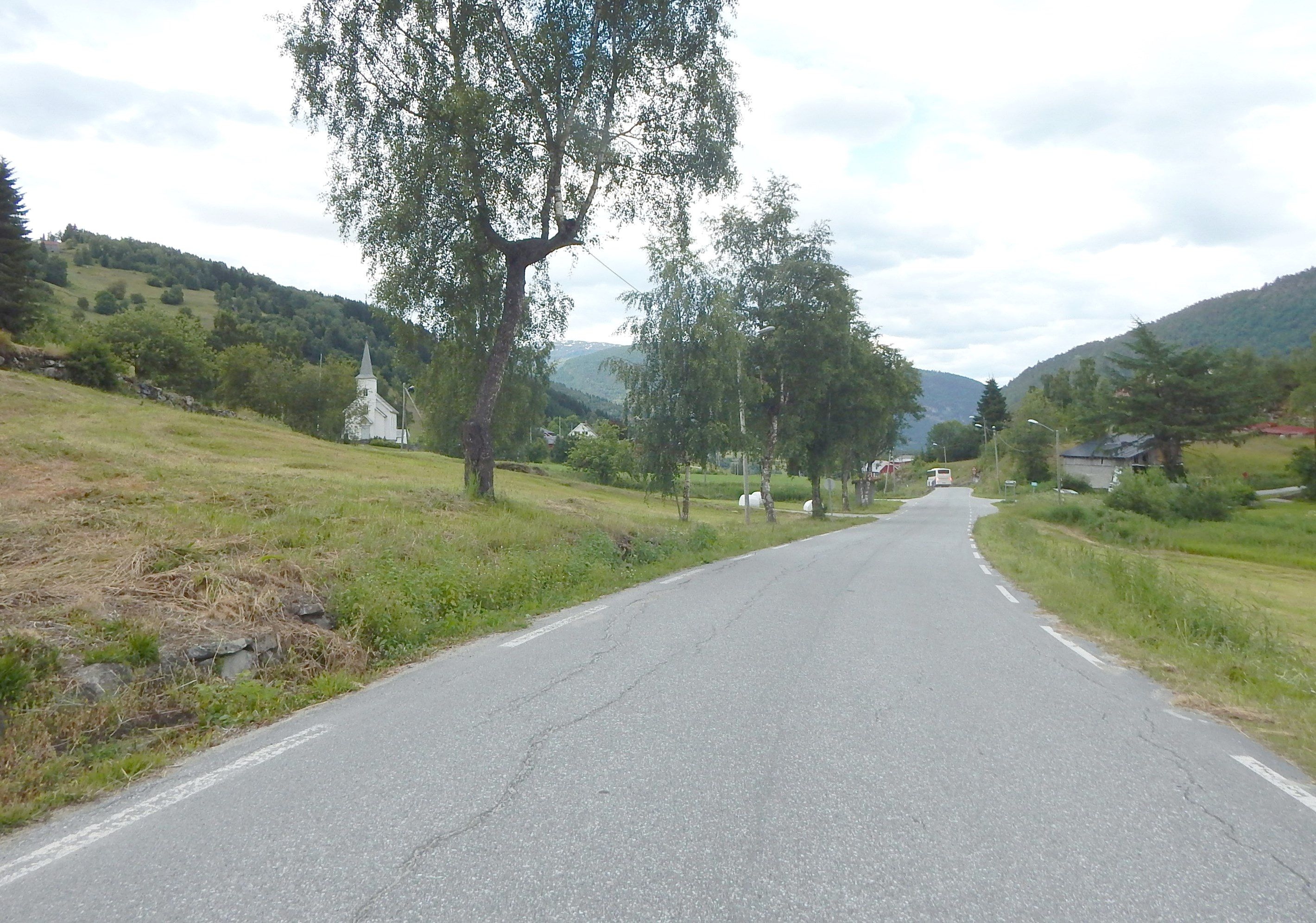 Fylkesvei 339 forbi Fet kirke i Luster